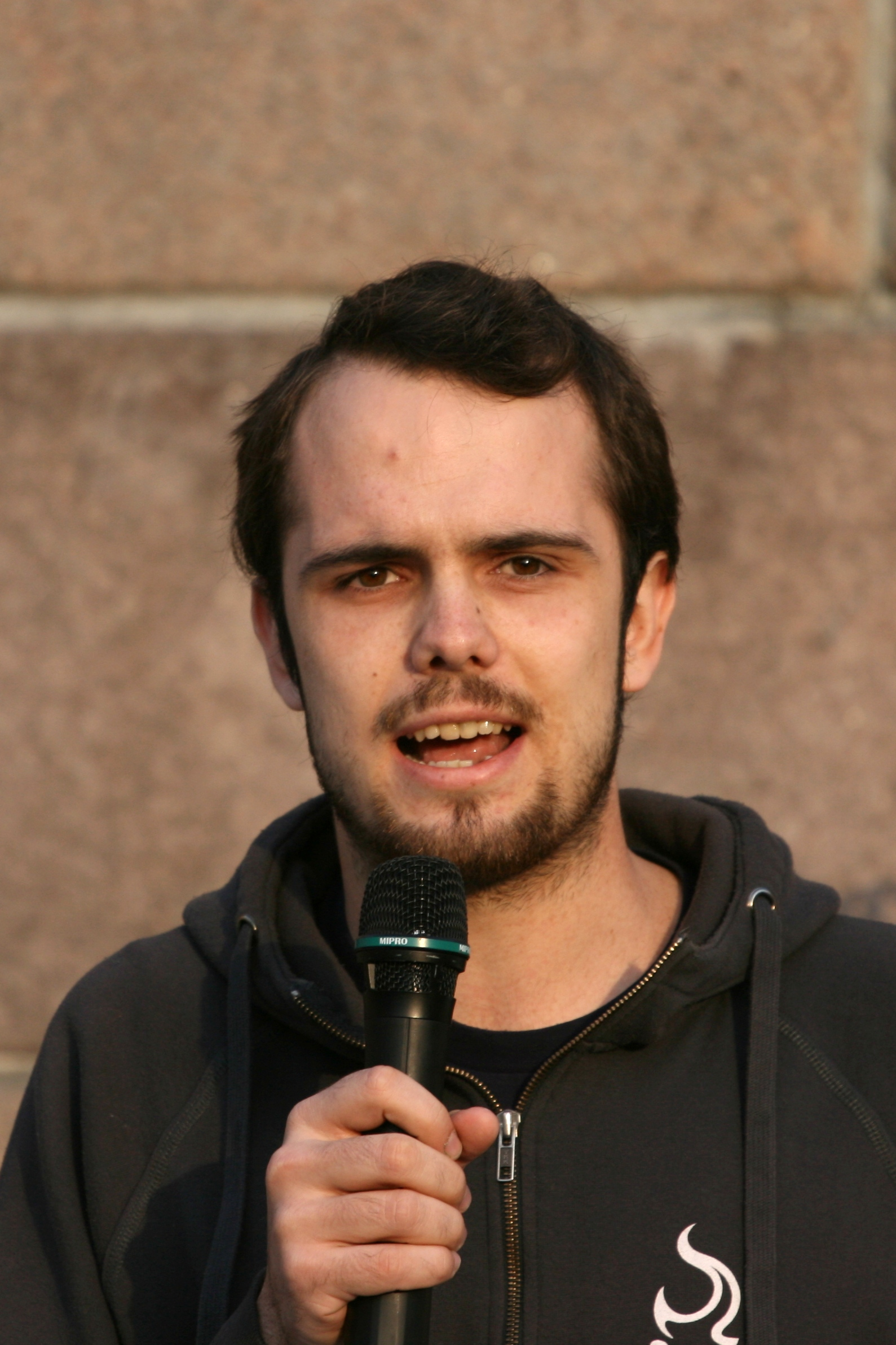 Christoffer Torris Olsen (Unge Venstre) under en demonstrasjon for et fritt Internett utenfor Stortinget 29. april 2009.